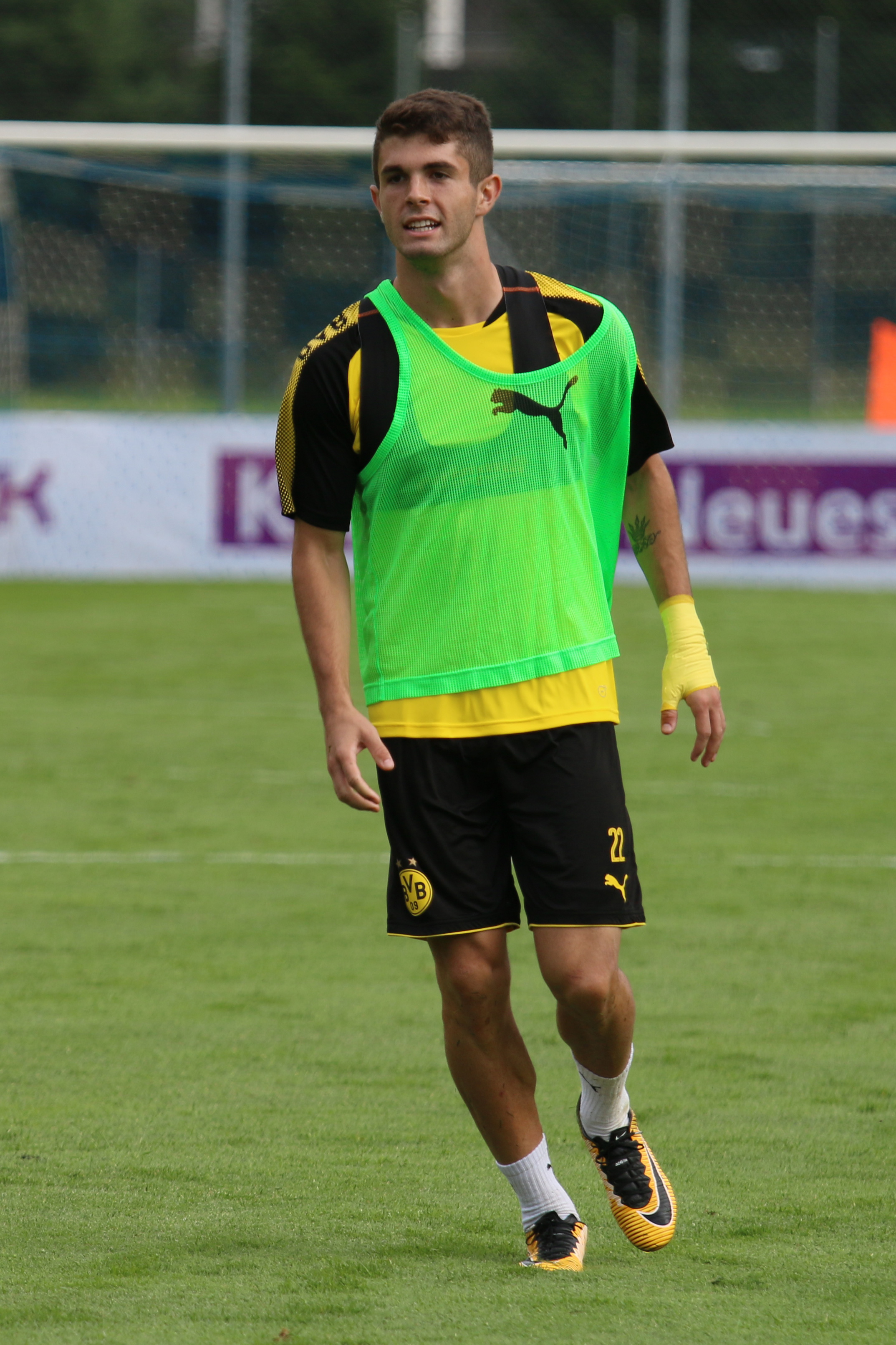 Christian Pulisic im BVB Trainingslager in Bad Ragaz 2017